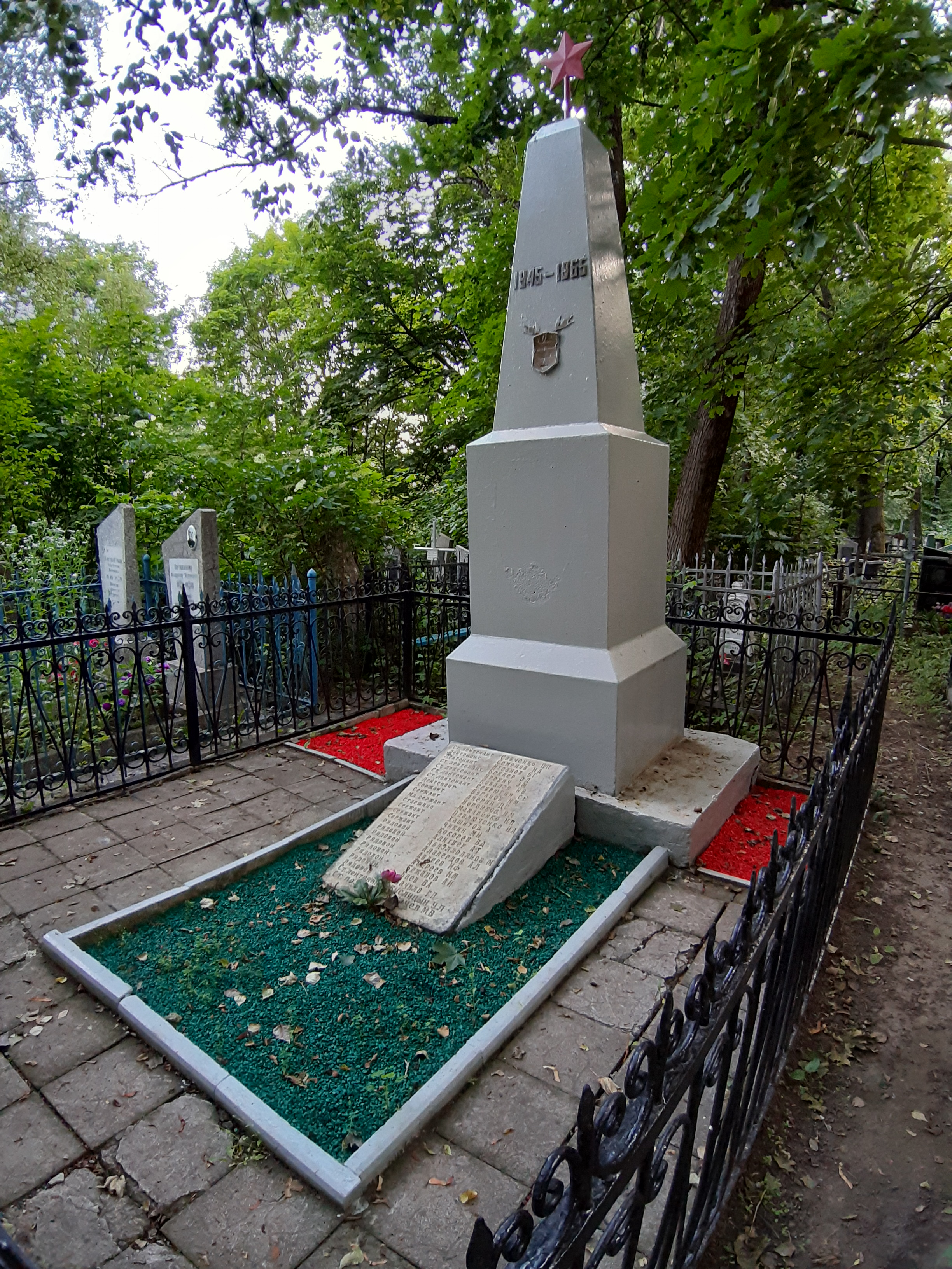 Магілёў. Машэкаўскія могілкі. Брацкія магілы